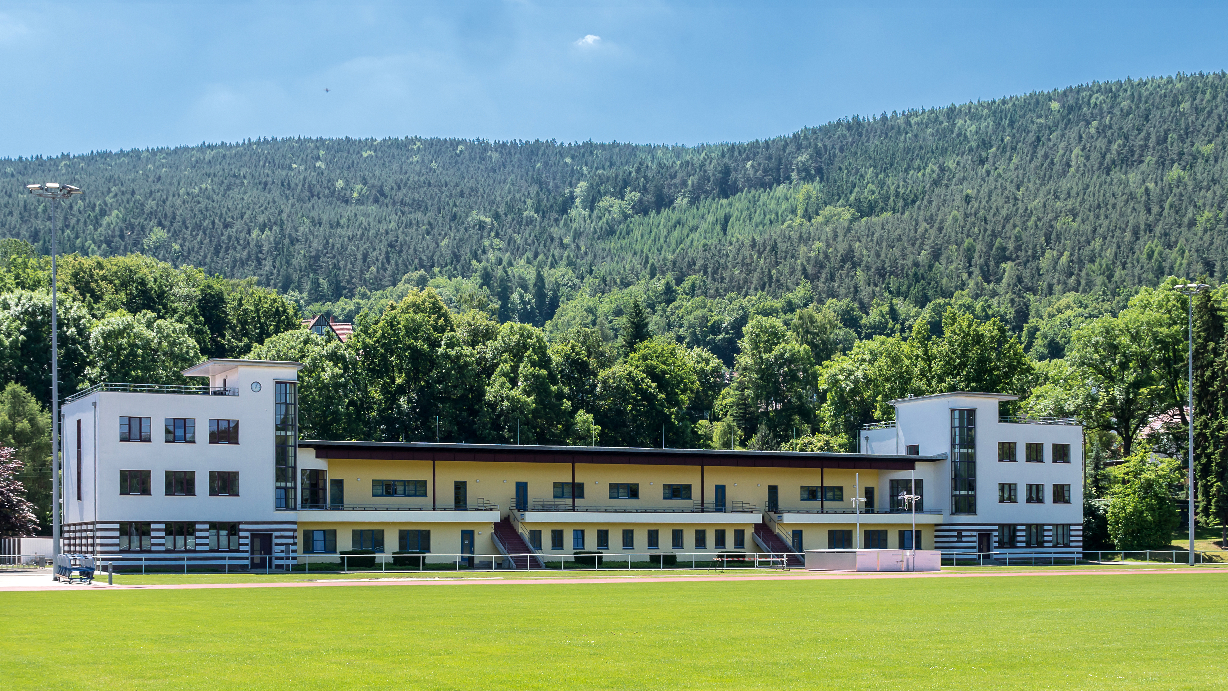 Denkmalgeschütztes ehemaligesTribünengebäude der Landessportschule Bad Blankenburg Wirbacherstraße 10